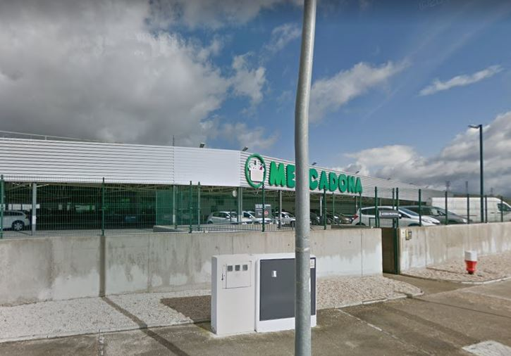 Carretera Bilbao